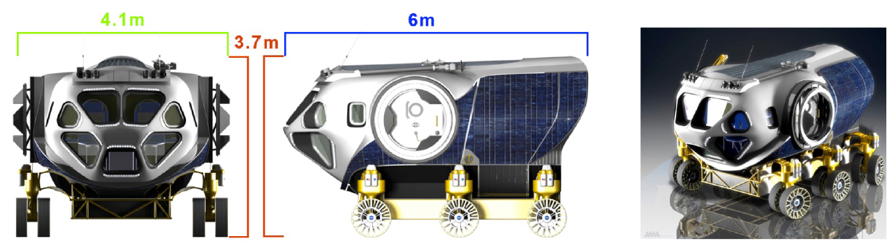 Human Exploration of Mars Middle-size-pressurized-rover source : NASA Design Reference Architecture 5.0 Annexe 2 (2014)